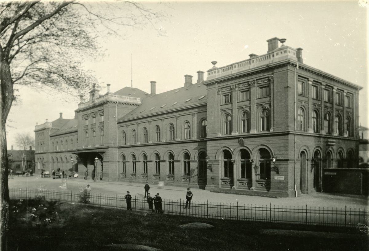 Den anden banegårdsbygning, Aarhus Hovedbanegård, 1905